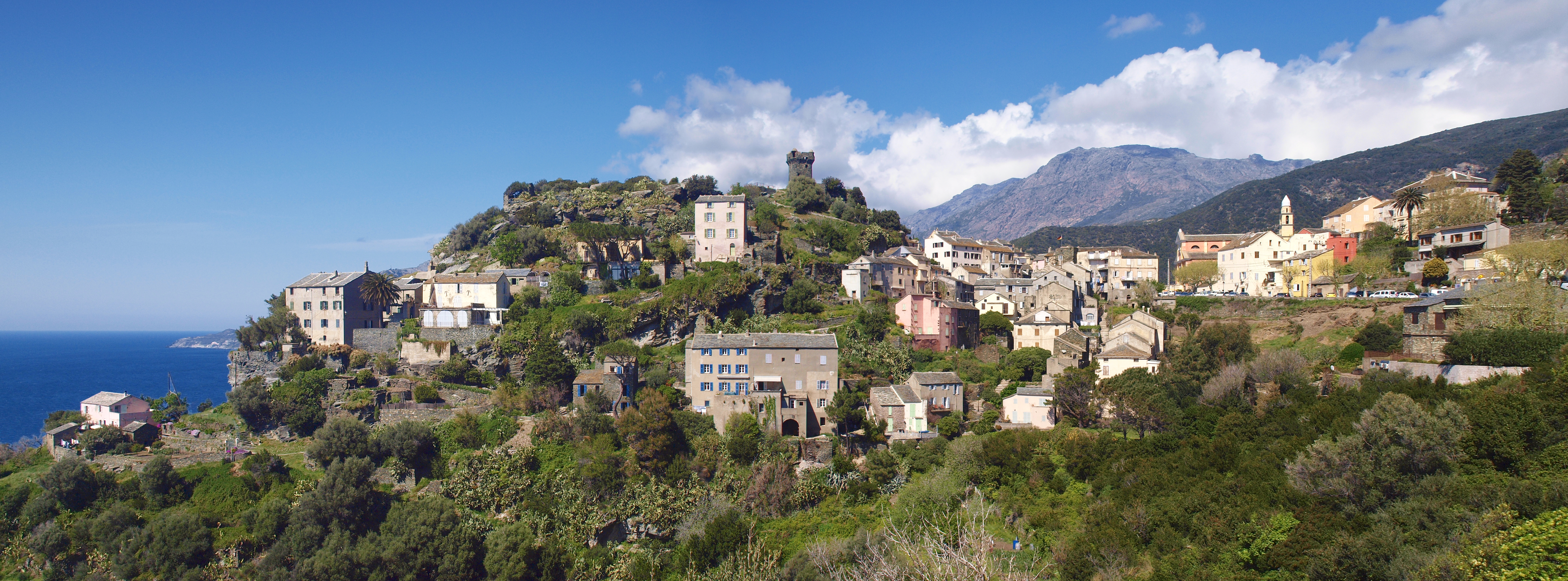 Nonza (Corsica) - Panorama